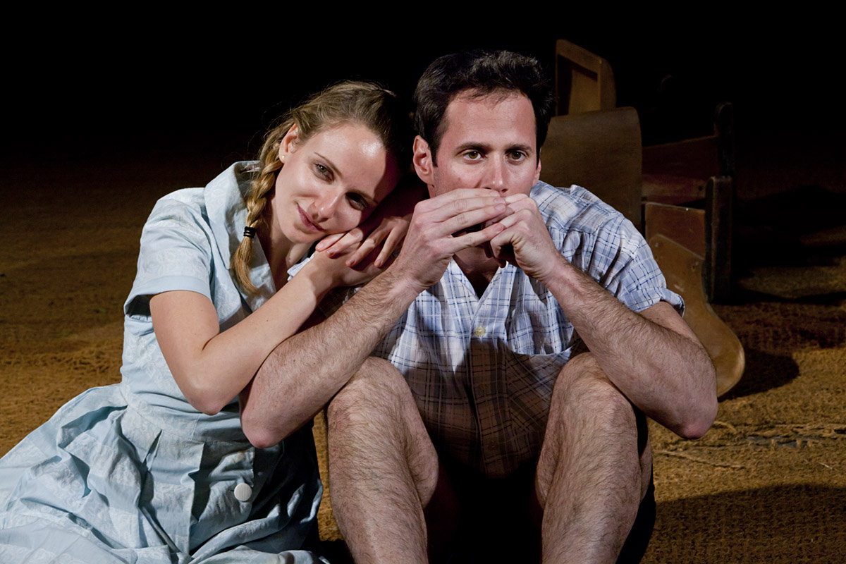 מיכאל גמליאל וקארין סרויה ב"בין לילה ובין שחר" בבימויו של סלבה מלצב